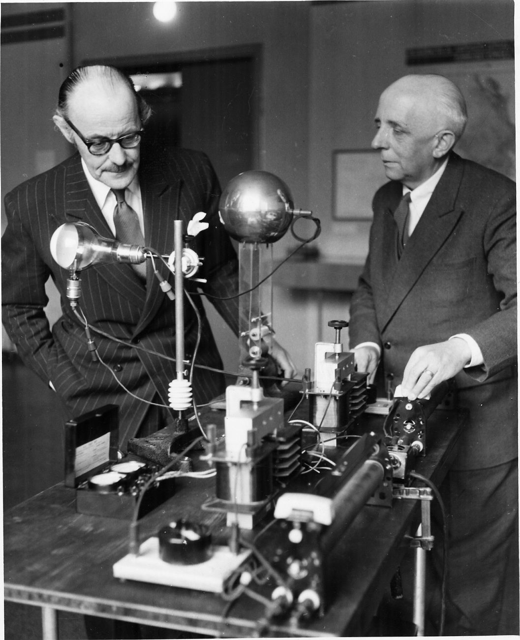 DIG93540. Museichef Torsten Althin och ingenjör Torsten Wilner i avdelningen Fysik på Tekniska Museet.